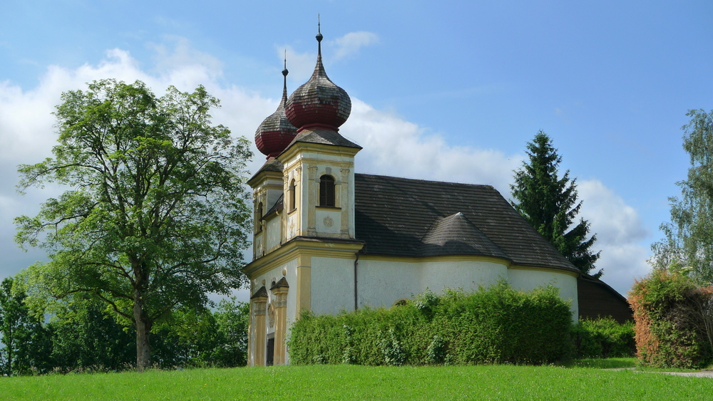 Evang. Filialkirche, Kalvarienbergkirche